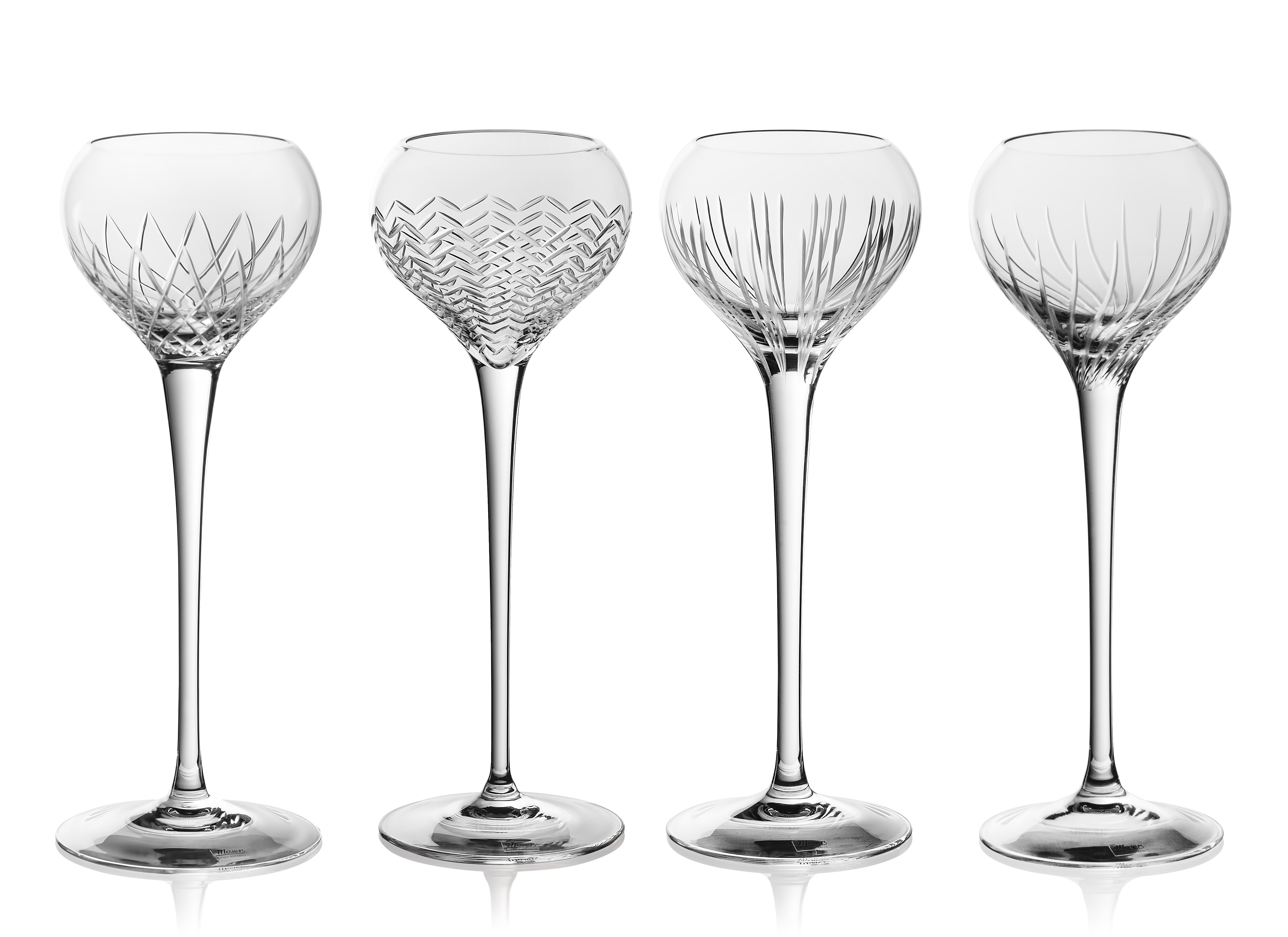 Бокалы «Kupola», вошедшие в основной фонд Государственного исторического музея, 2016 г.